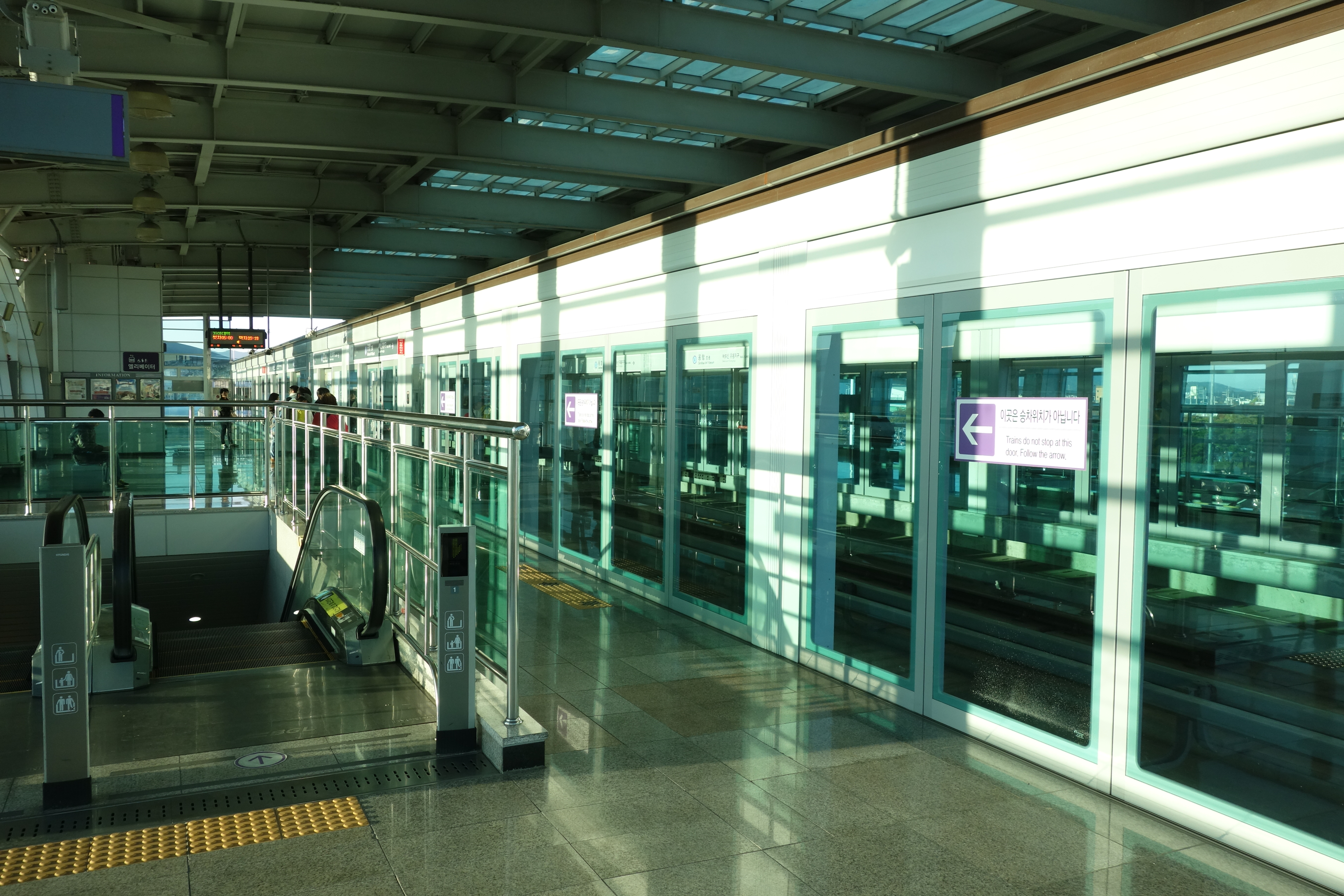 釜山金海軽電鉄 空港駅ホーム